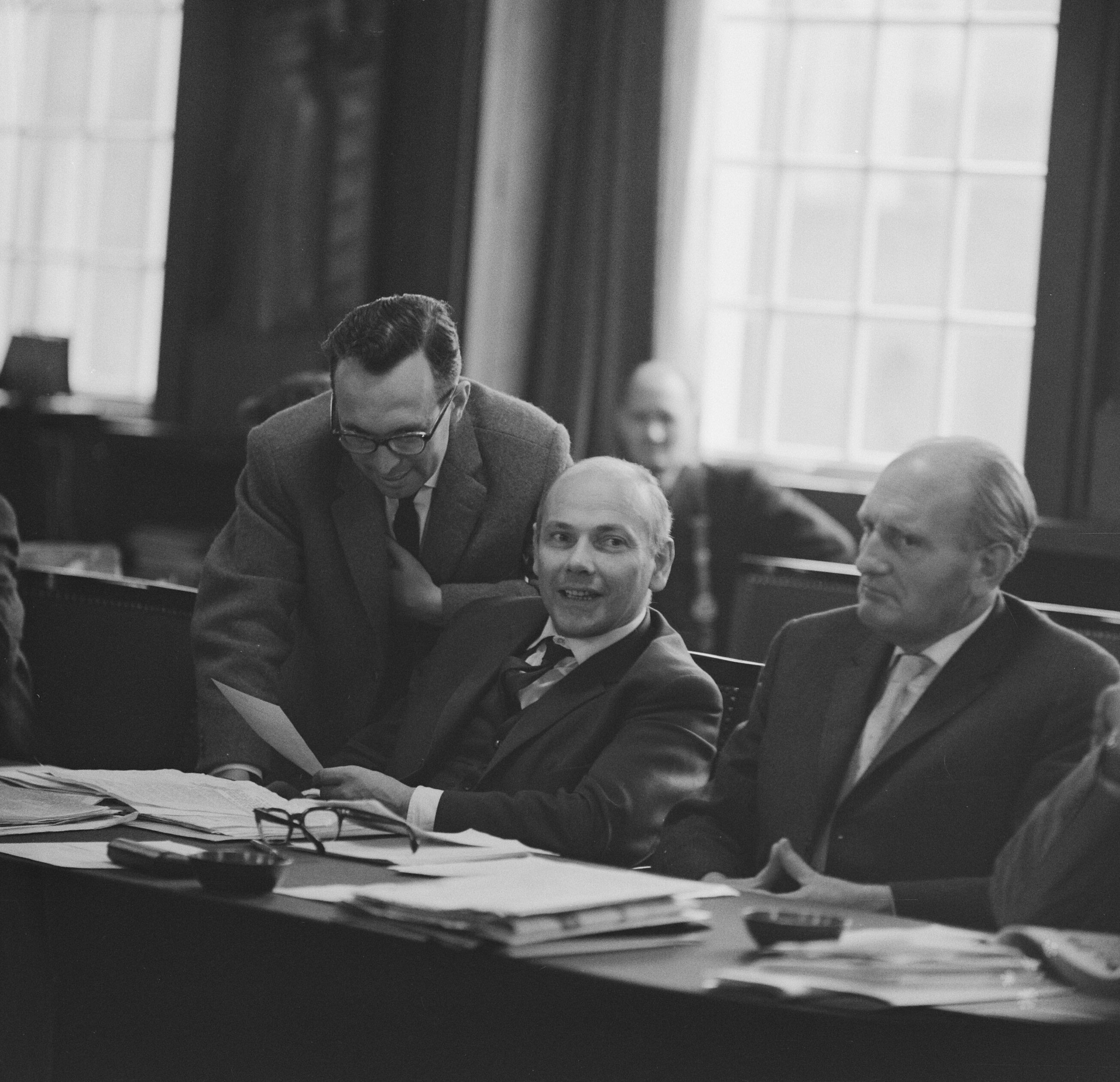 Collectie / Archief : Fotocollectie Anefo Reportage / Serie : [ onbekend ] Beschrijving : Behandeling "Stadhuisontwerp" in de gemeenteraad. Wethouder Den Uyl (PVDA) in gesprek met Schulte Fischedick Datum : 18 oktober 1961 Locatie : Amsterdam Trefwoorden : gemeenteraden, portretten, wethouders Persoonsnaam : Uyl, Joop den Instellingsnaam : PvdA Fotograaf : Nijs, Jac. de / Anefo Auteursrechthebbende : Nationaal Archief Materiaalsoort : Negatief (zwart/wit) Nummer archiefinventaris : bekijk toegang 2.24.01.03 Bestanddeelnummer : 913-0644